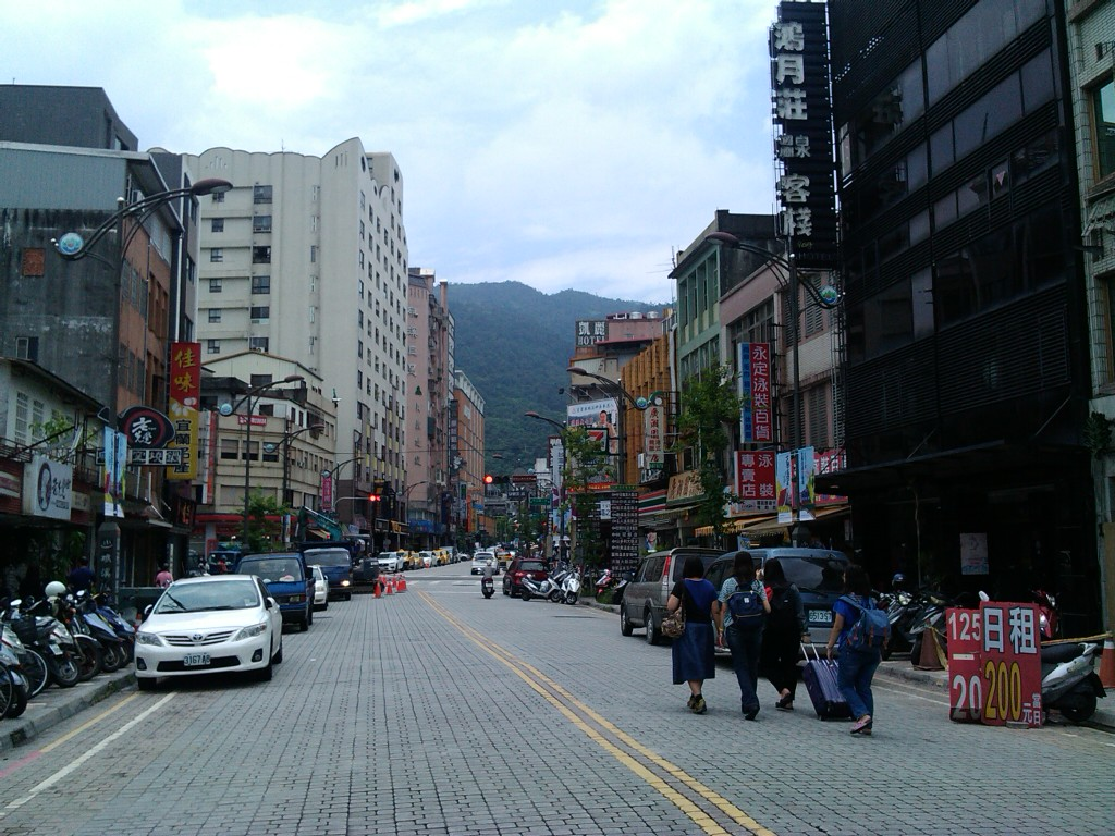 礁溪鄉溫泉路